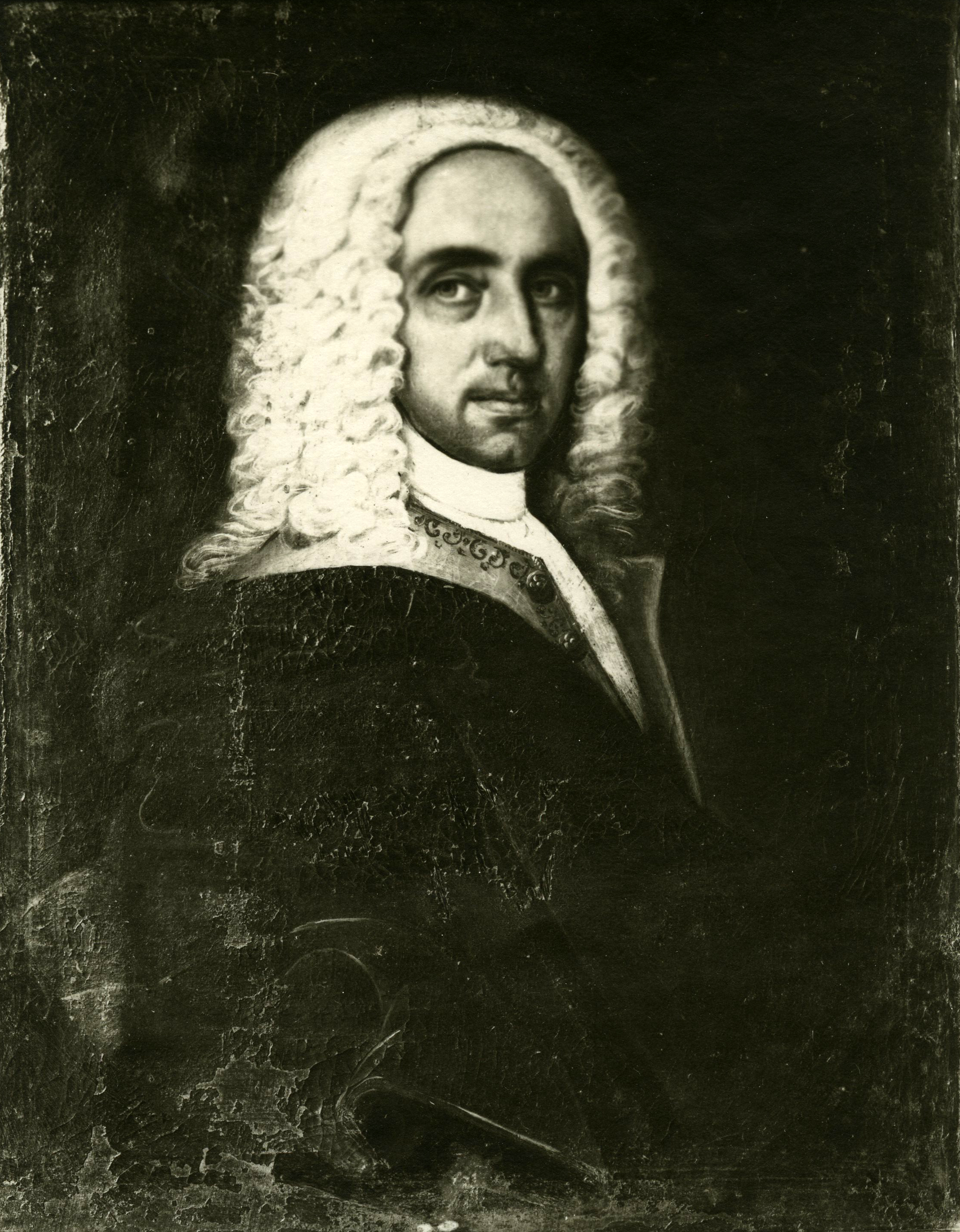 Format: Fotopositiv Dato / Date: Ukjent, mulig 1887 Fotograf / Photographer: Mulig Erik Olsen Sted / Place: Trondheim Eier / Owner Institution: Trondheim byarkiv, The Municipal Archives of Trondheim Arkivreferanse / Archive reference: Tor.H41.B43.F3131 Merknad: Christopher Nielsen Tønder, f. 20.1.1587 i Tønder, d. 31.12.1656 på Bremsnes i Averøy, nevnes som fogd på Austrått i 1621. Han var sønn av Niels Mortensen Tønder og hustru Marie Pedersdetter Leck. 1. gang ble Chr. Tønder gift med Sidsel Andersdatter, født i København, d. 9.3.1630. Hun var datter av mestersmed Anders Bentziger på Bremerholmen. 2. gang ble Christopher Tøndel gift 1631 med datteren av borgermesteren i Trondheim, Karen Olsdatter Schriver, født i Trondheim, d. etter 1661. Fogden hadde 10 barn i første og 9 barn i andre ekteskap. Under et barselsgilde på Austrått 1621, da ett av barna ble døpt, diktet biskop Anders Arrebo (1587 - 1637), som var til stede, en skjemtevise som fikk skjebnesvangre konsekvenser for ham: En herredag i Bergen året etter fradømte ham biskopembetet. Christopher Tønder ble fogd i Namdalen, deretter i Fosen (1625 - 1636). Sist (1647 - 1656) var han toller i Lille-Fosen (Kristiansund). Kilde: Yrjar Heimbygdslag .